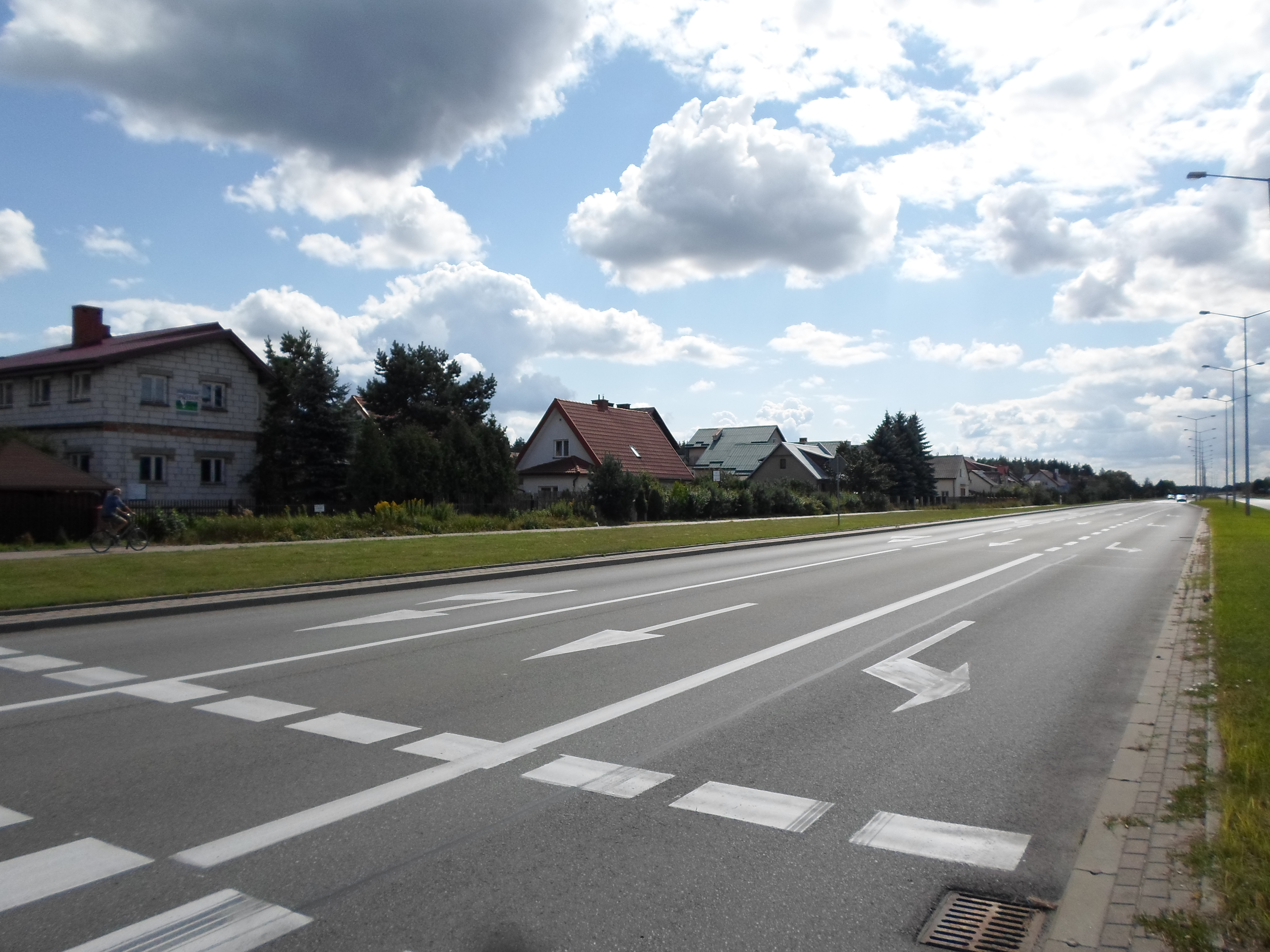 Widok na ulicę Przemysłową w Ełku i osiedle Pod Lasem w kierunku południowo-zachodnim